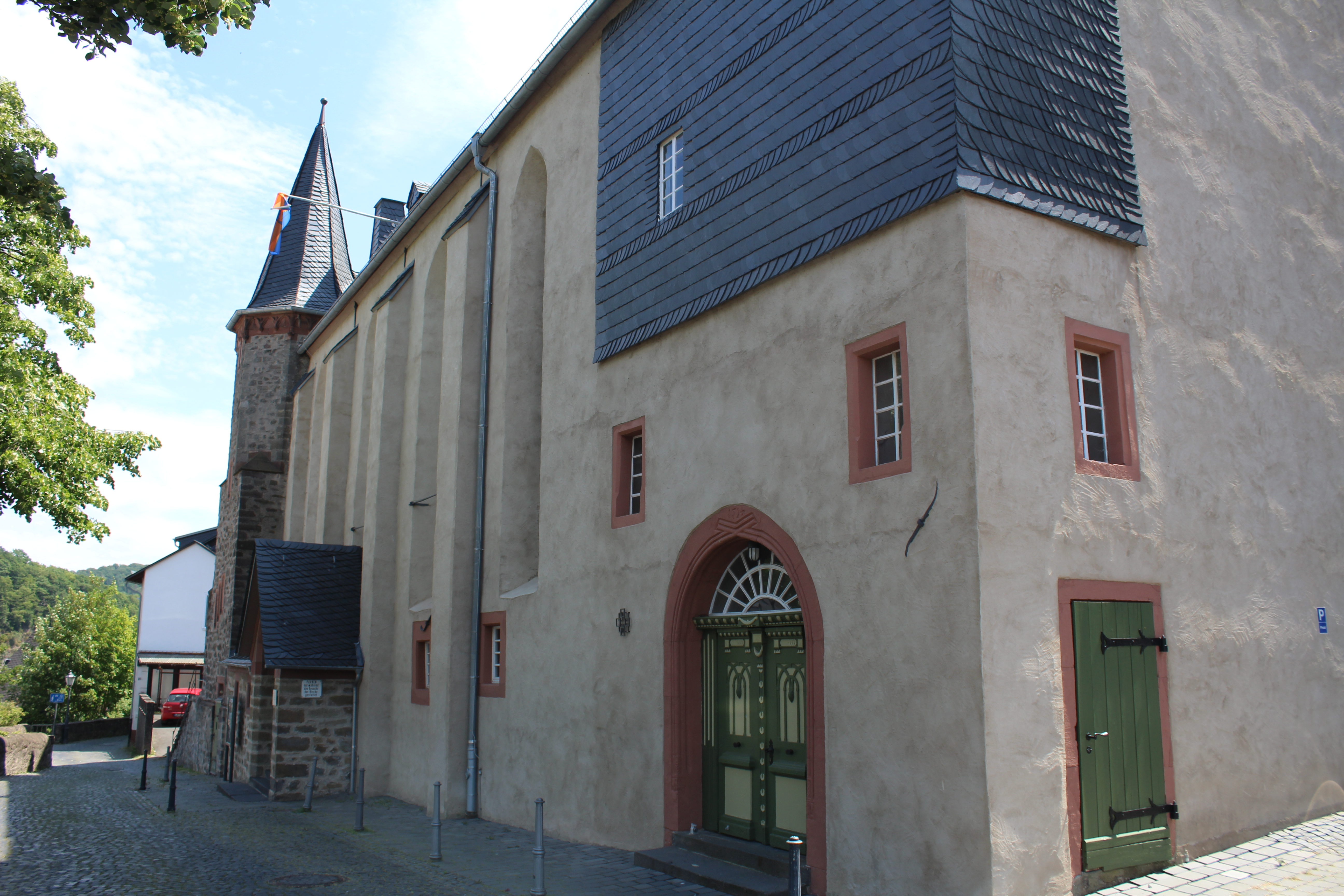 Evangelische Stadtkirche Dillenburg, Hessen, Deutschland